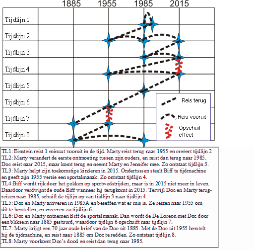 Dit is een door mij aangepaste versie van een afbeelding van de Engelstalige Wikipedia. Het origineel staat op en is door de auteur in het publieke domijn geplaatst.